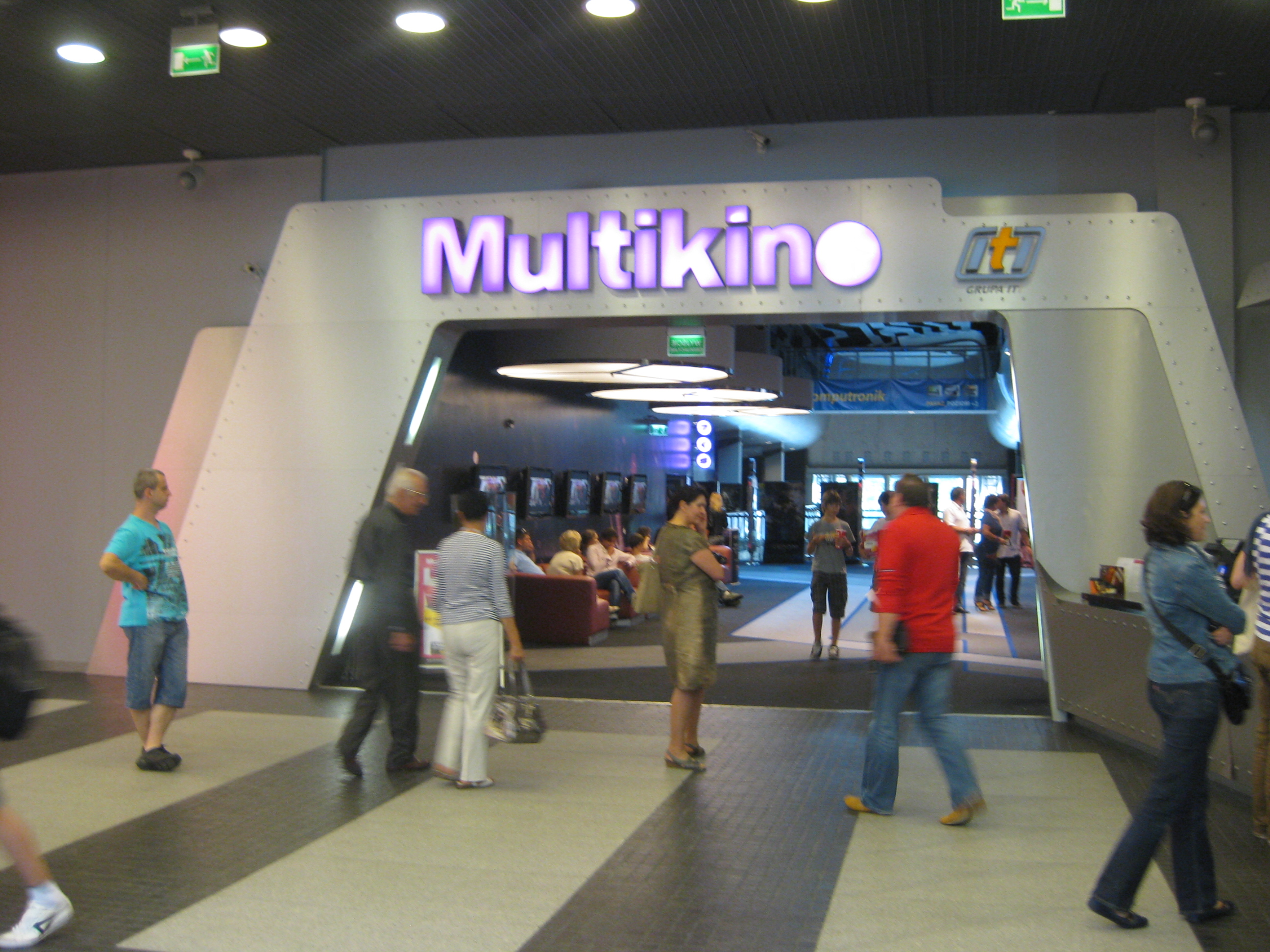 Stary Browar, Poznań, Poland